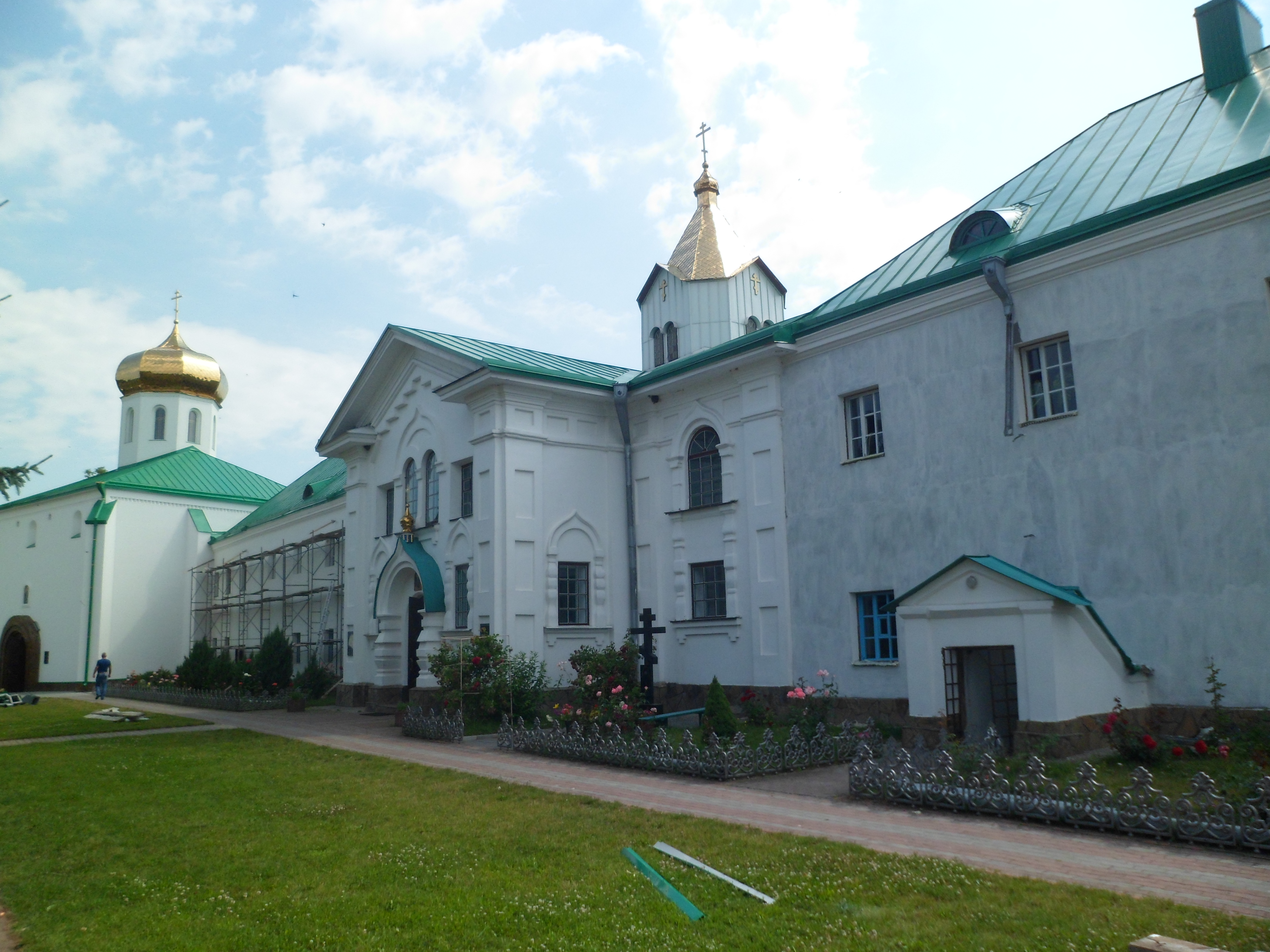 Корпус келій з теплою трапезною церквою (мур.), Мильці